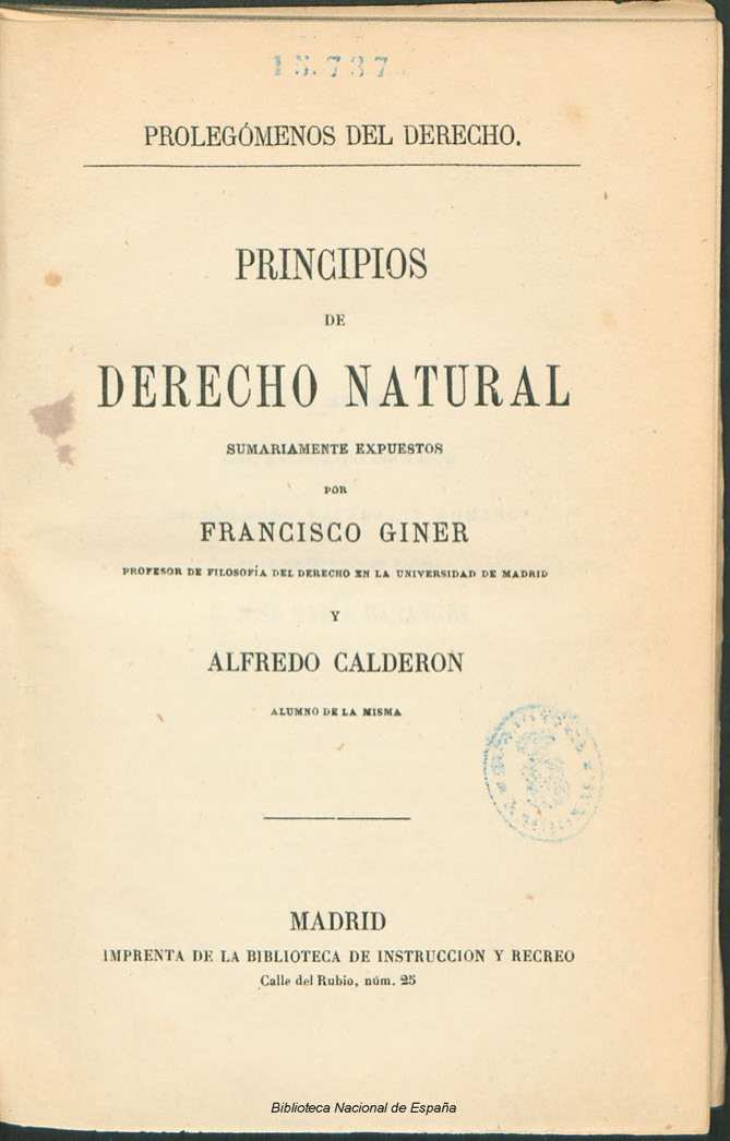 Principios del Derecho natural : sumariamente expuestos por Francisco Giner y Alfredo Calderón Autor: Giner de los Ríos, Francisco (1839-1915) Fecha: 1873 Datos de edición: Madrid, Imp. de la Biblioteca de Instrucción y Recreo